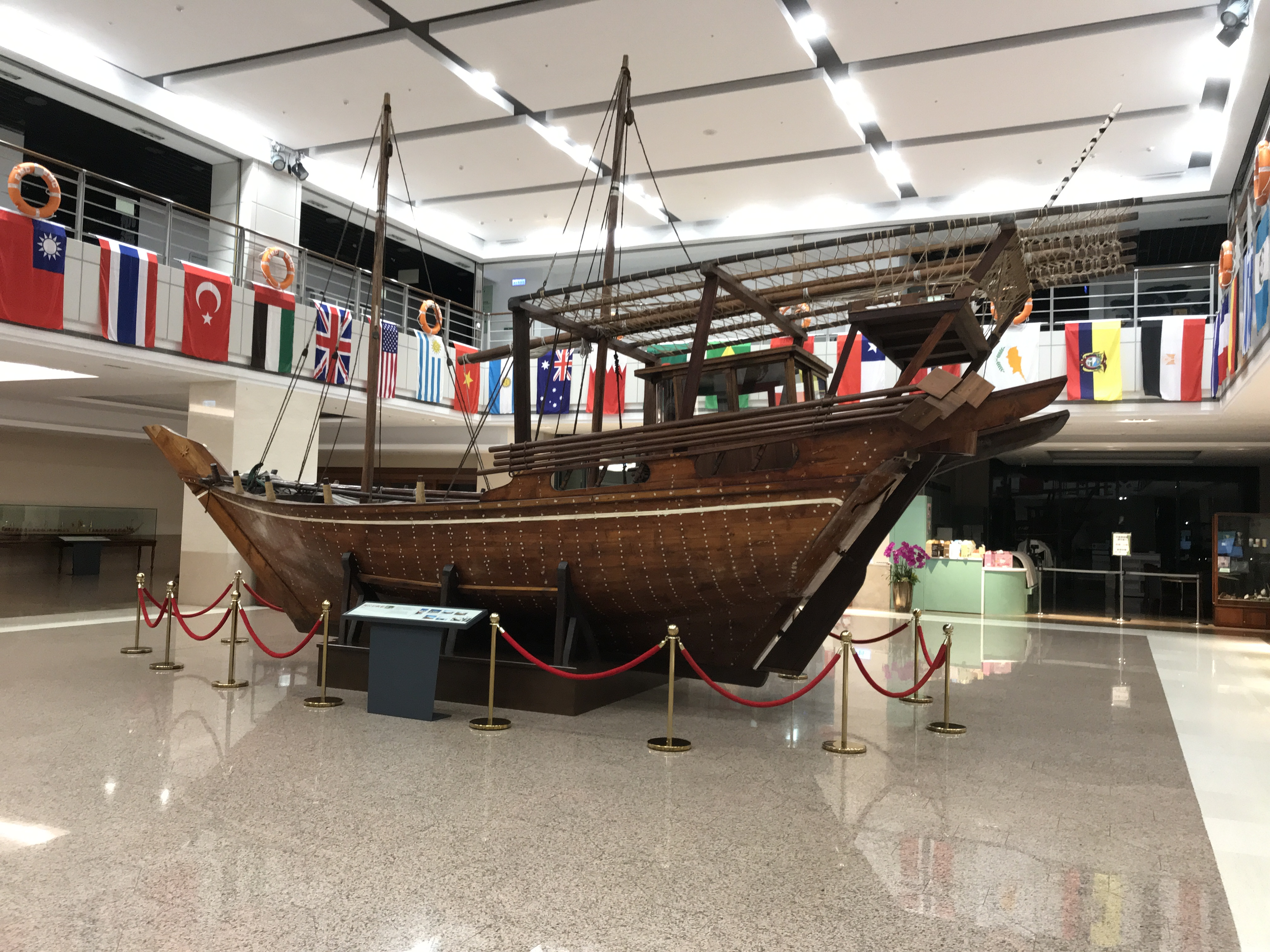 張榮海事博物館の1階ロビー中央に展示された木製のダウ船。